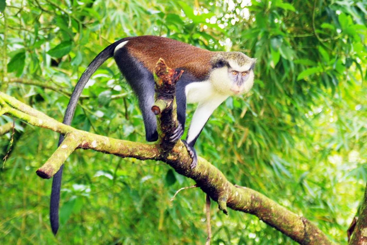 Mona-Affe auf Grenada